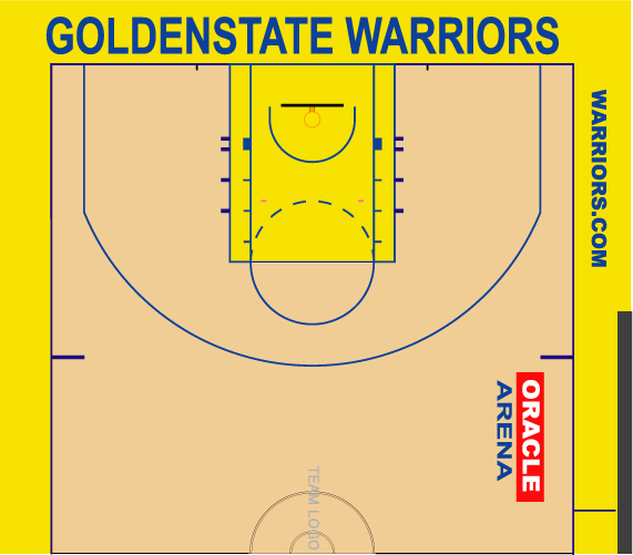 ウォーリアーズホームコート配色